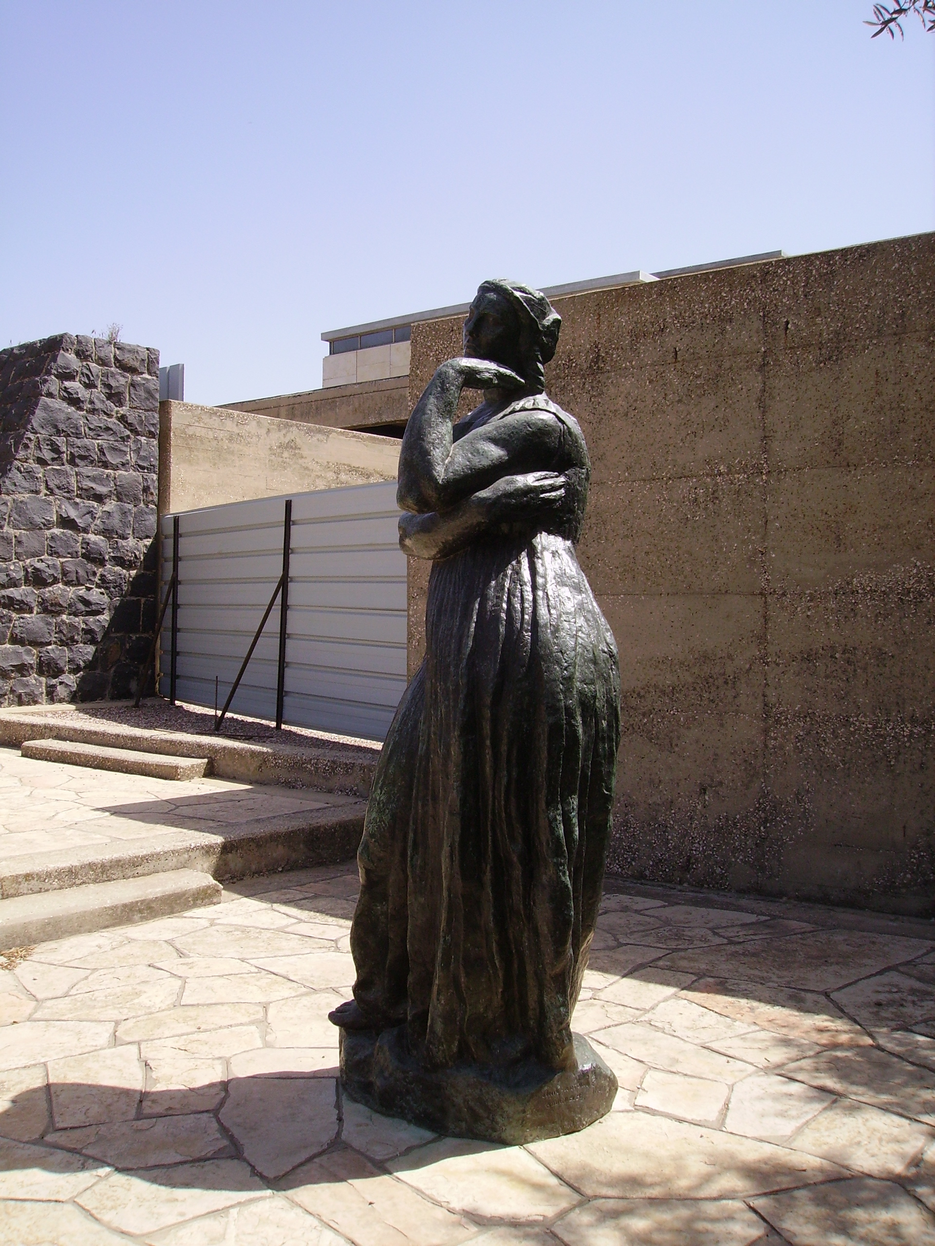 La Grande Penelope by Antoine Bourdelle